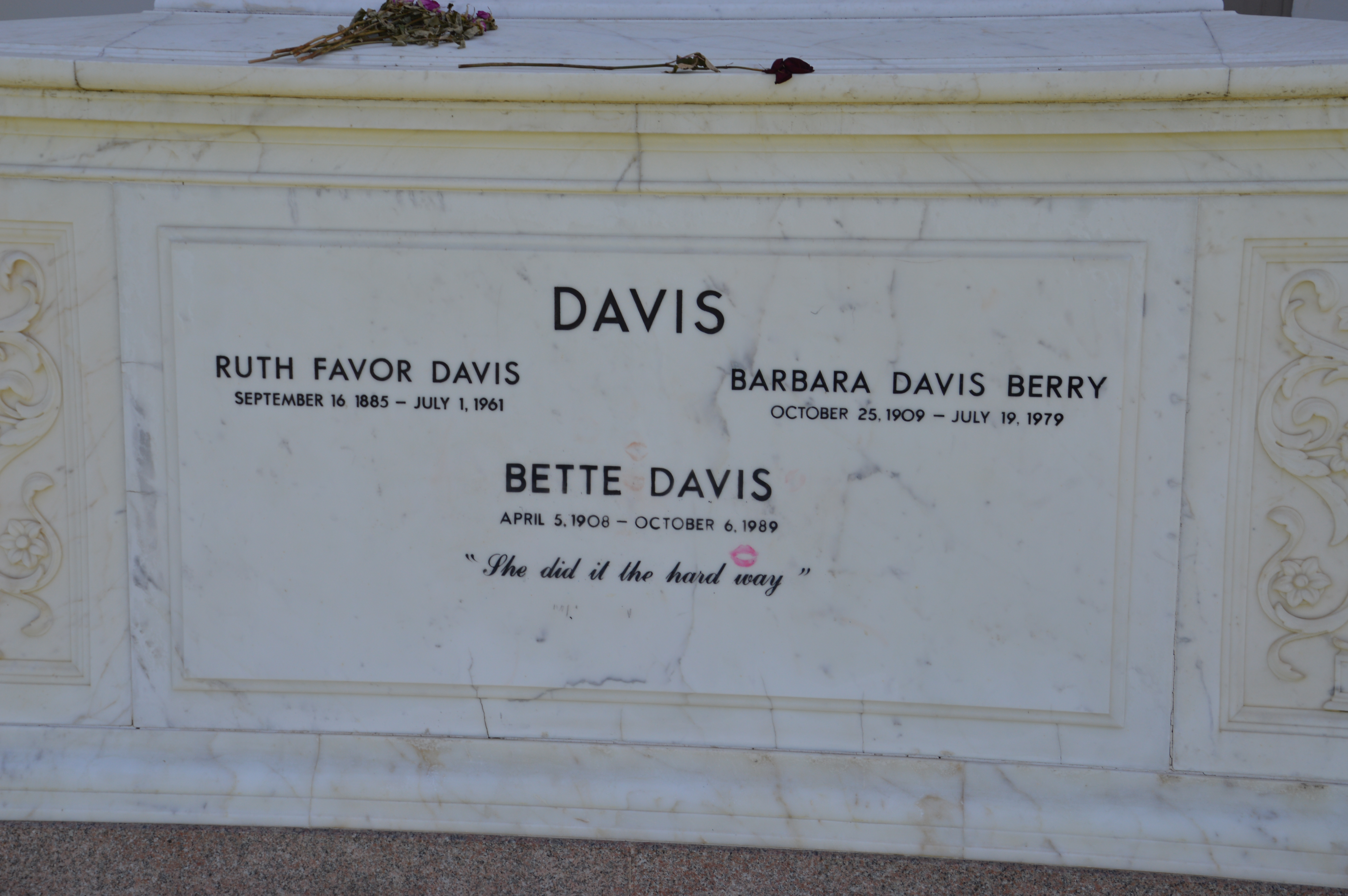 Grab von Bette Davis auf dem Forest Lawn Memorial Park Hollywood Hills